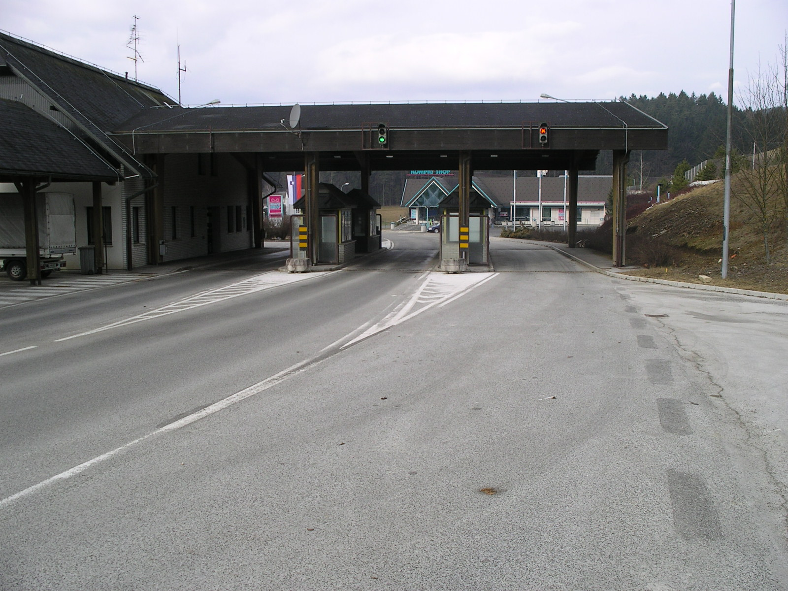 MMP Holmec pred rušenjem